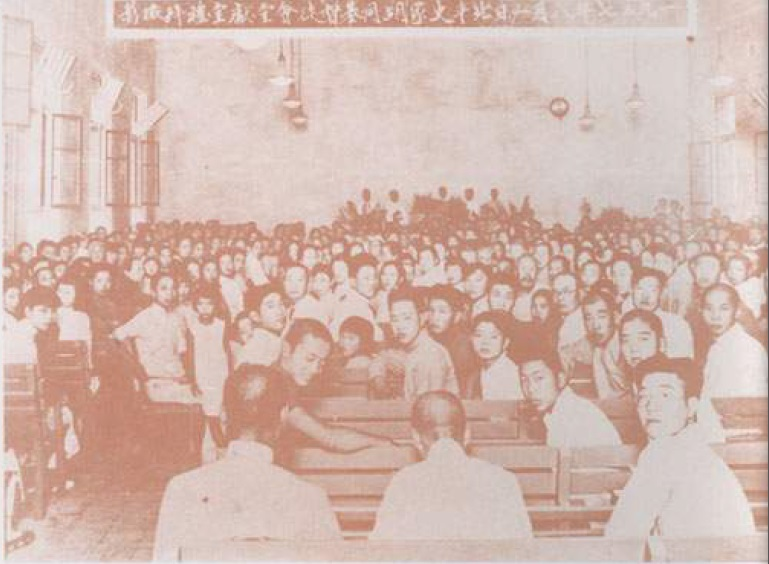 中文（中国大陆）: 1937年8月1日北京基督徒会堂献堂礼拜